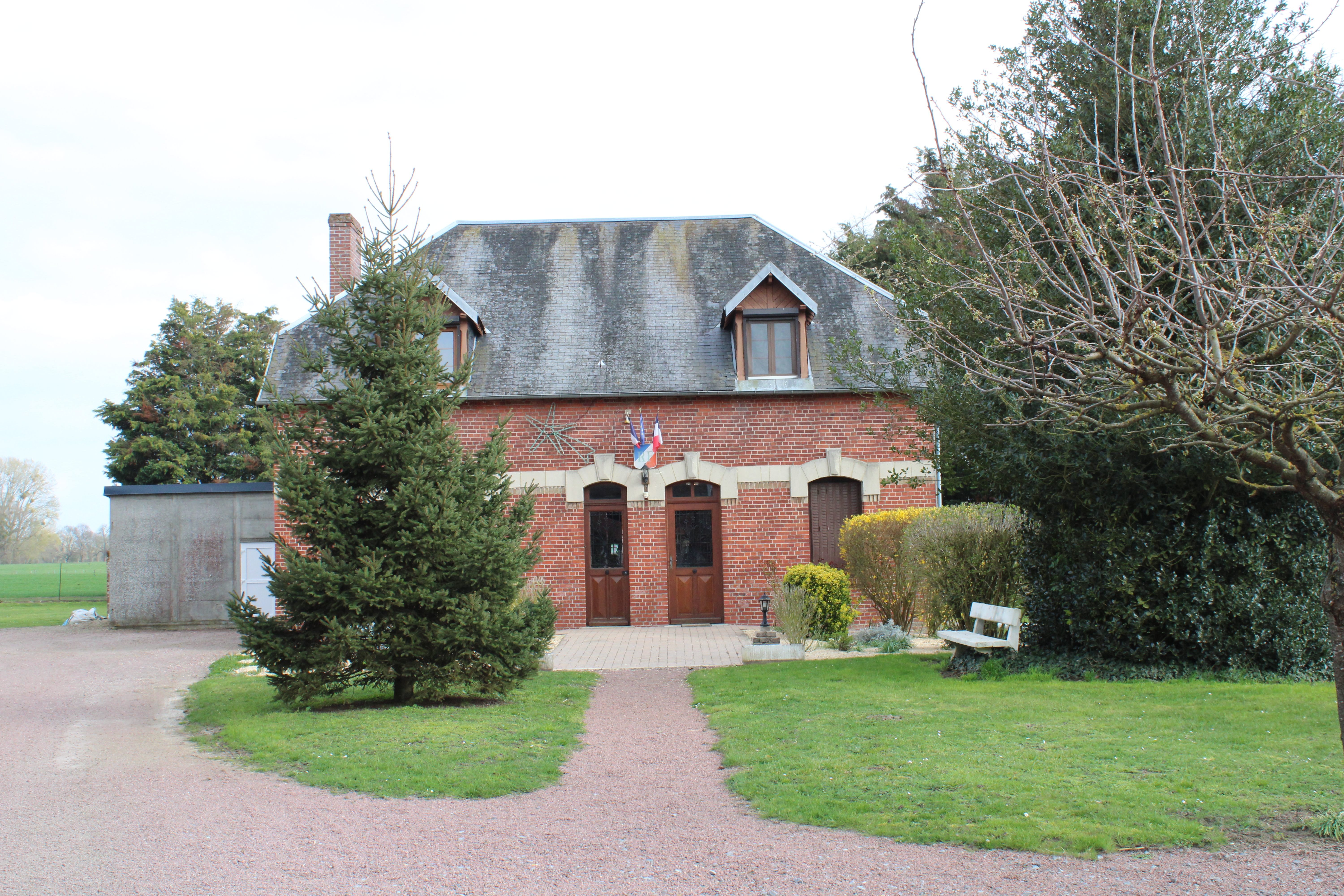 La mairie